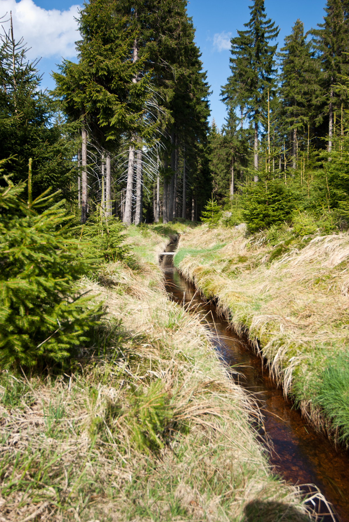 Horní Blatná, Krušné hory, Blatenský příkop; více